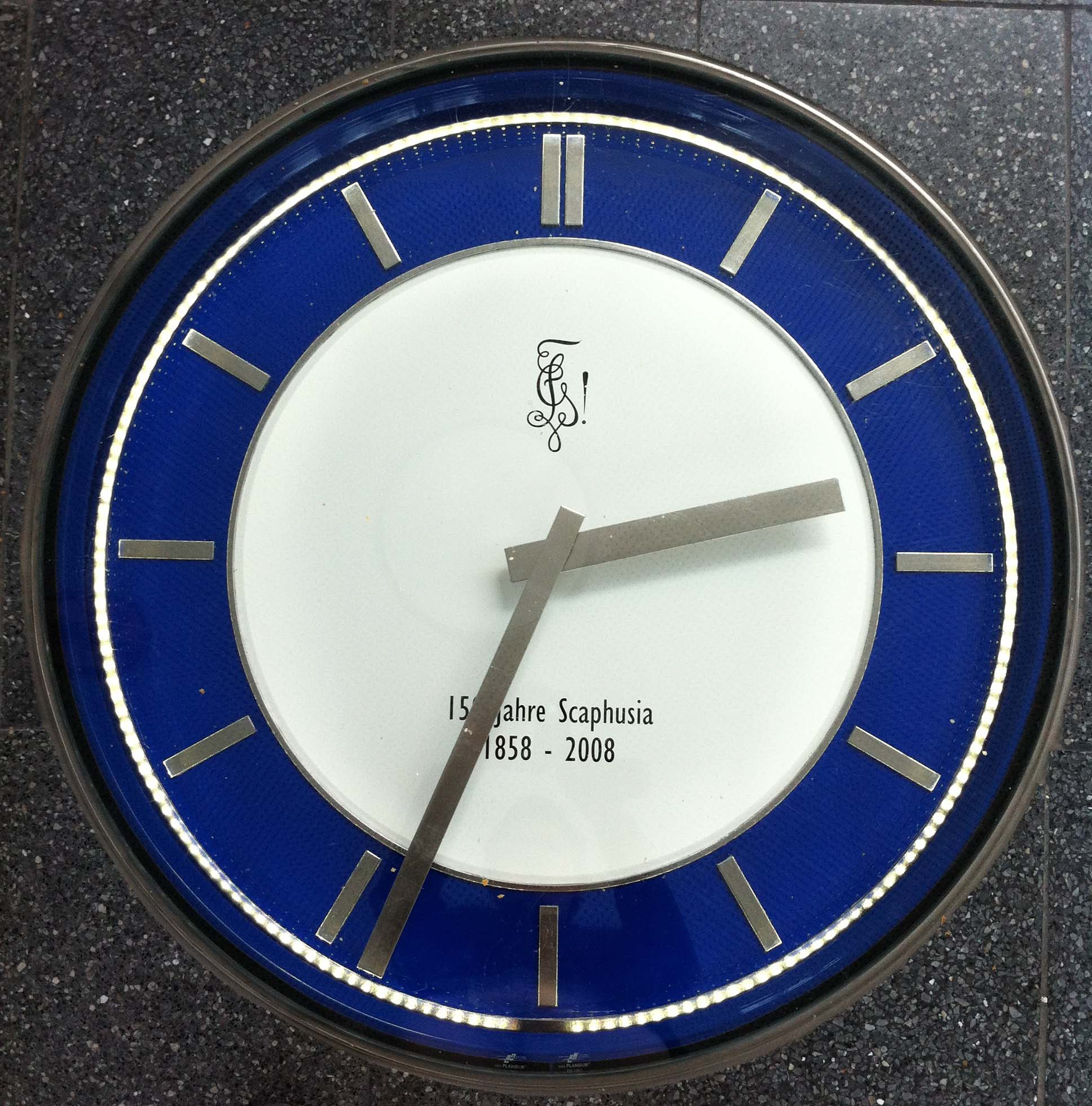 Die Bodenuhr im Verbindungstrakt der Kantonsschule Schaffhausen